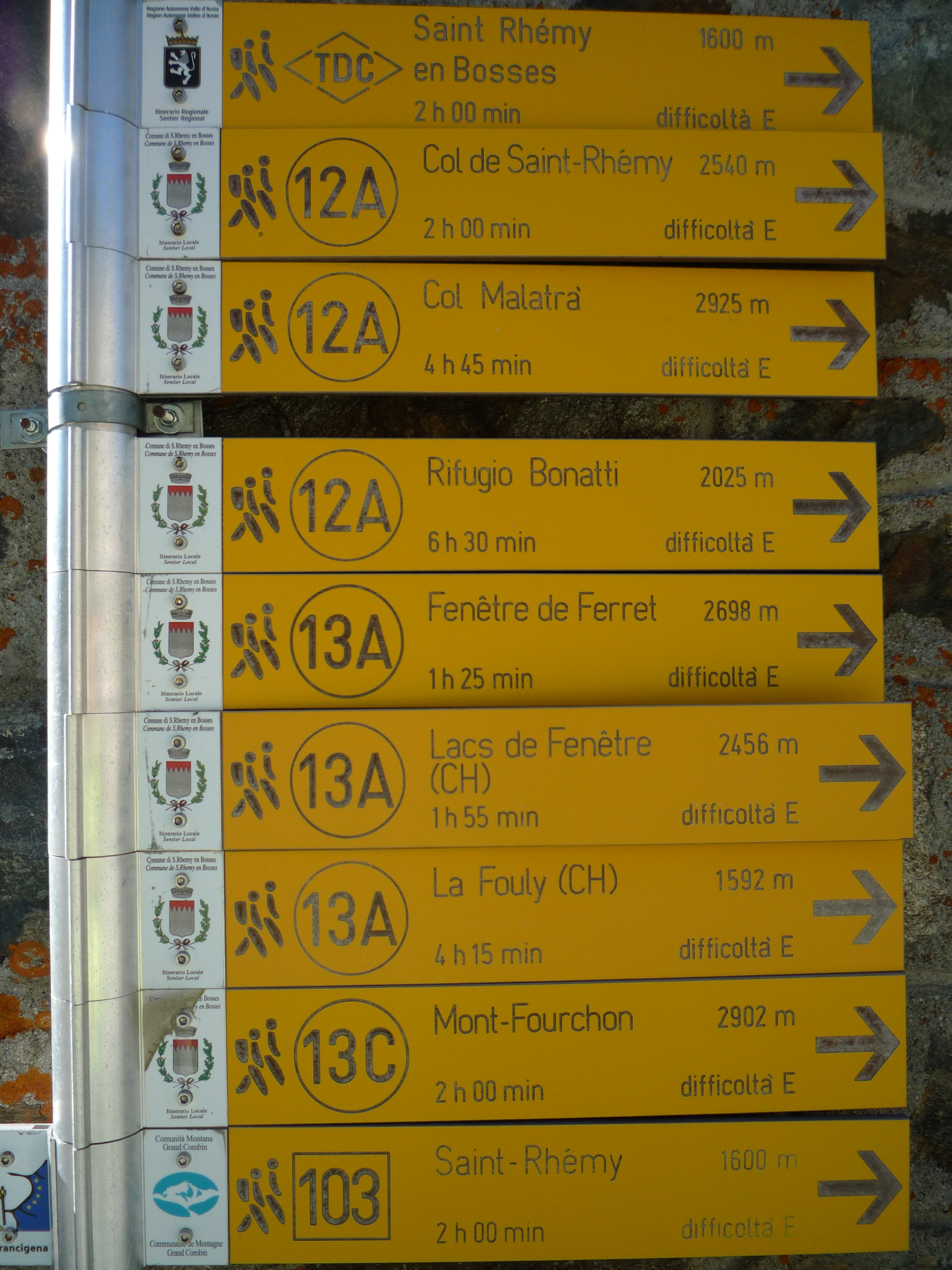 Ce panneau de randonnée se trouve au Col du Grand-Saint-Bernard, du côté Italien. Les estimations de parcours sont calculées en fonction des beaux jours (sans neige)